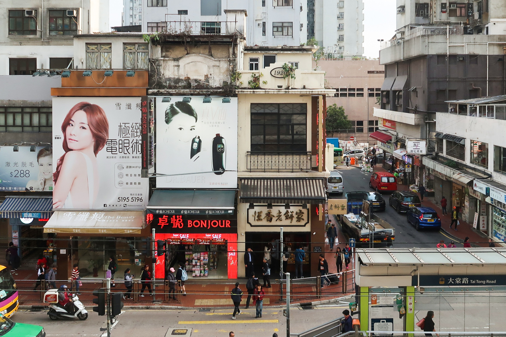 Hang Heung Cake Shop Company